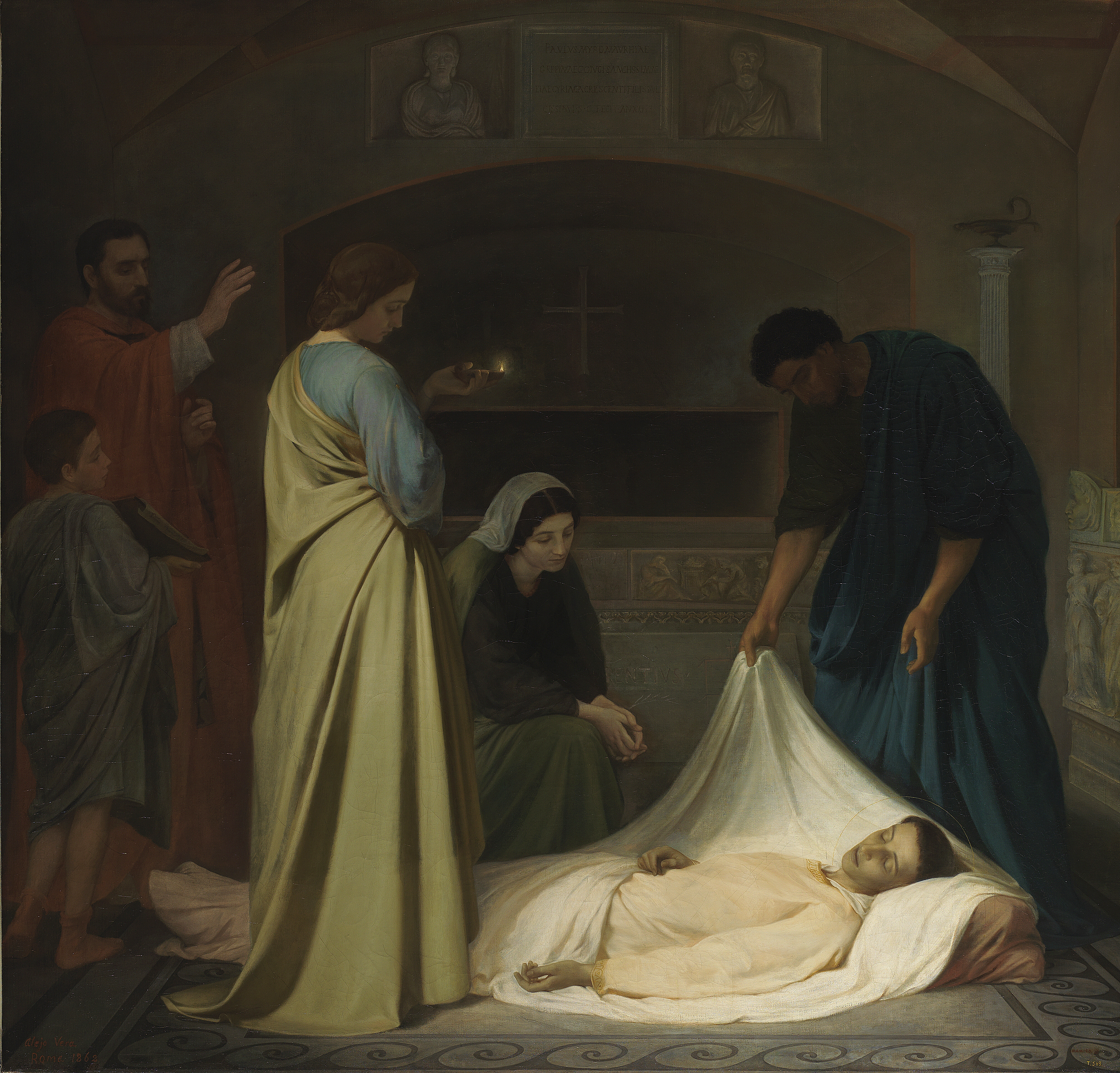 El lienzo representa el entierro del mártir cristiano San Lorenzo, que fue quemado vivo en una parrilla el día 10 de agosto del año 258, cuatro días después de que el papa Sixto II fuera ejecutado por idénticas razones.